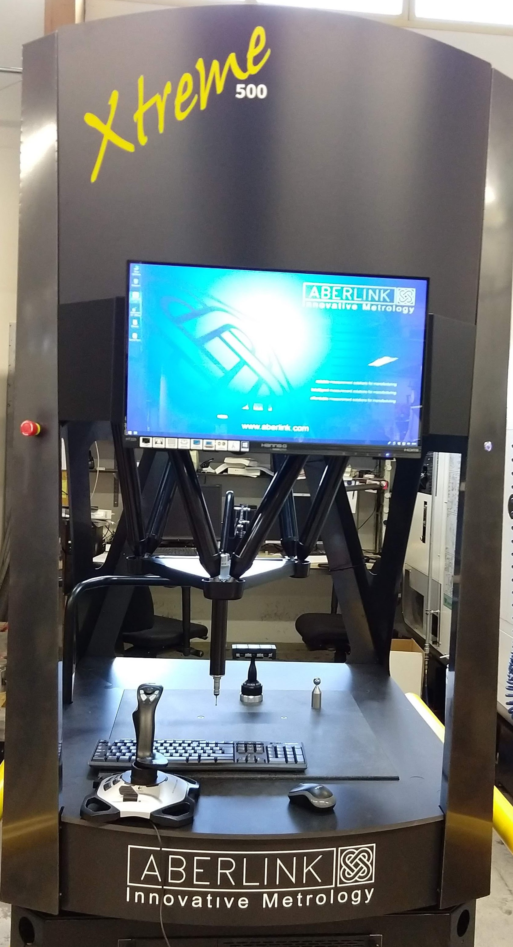 Lineaarimoottoreilla toimiva koordinaattimittauskone.